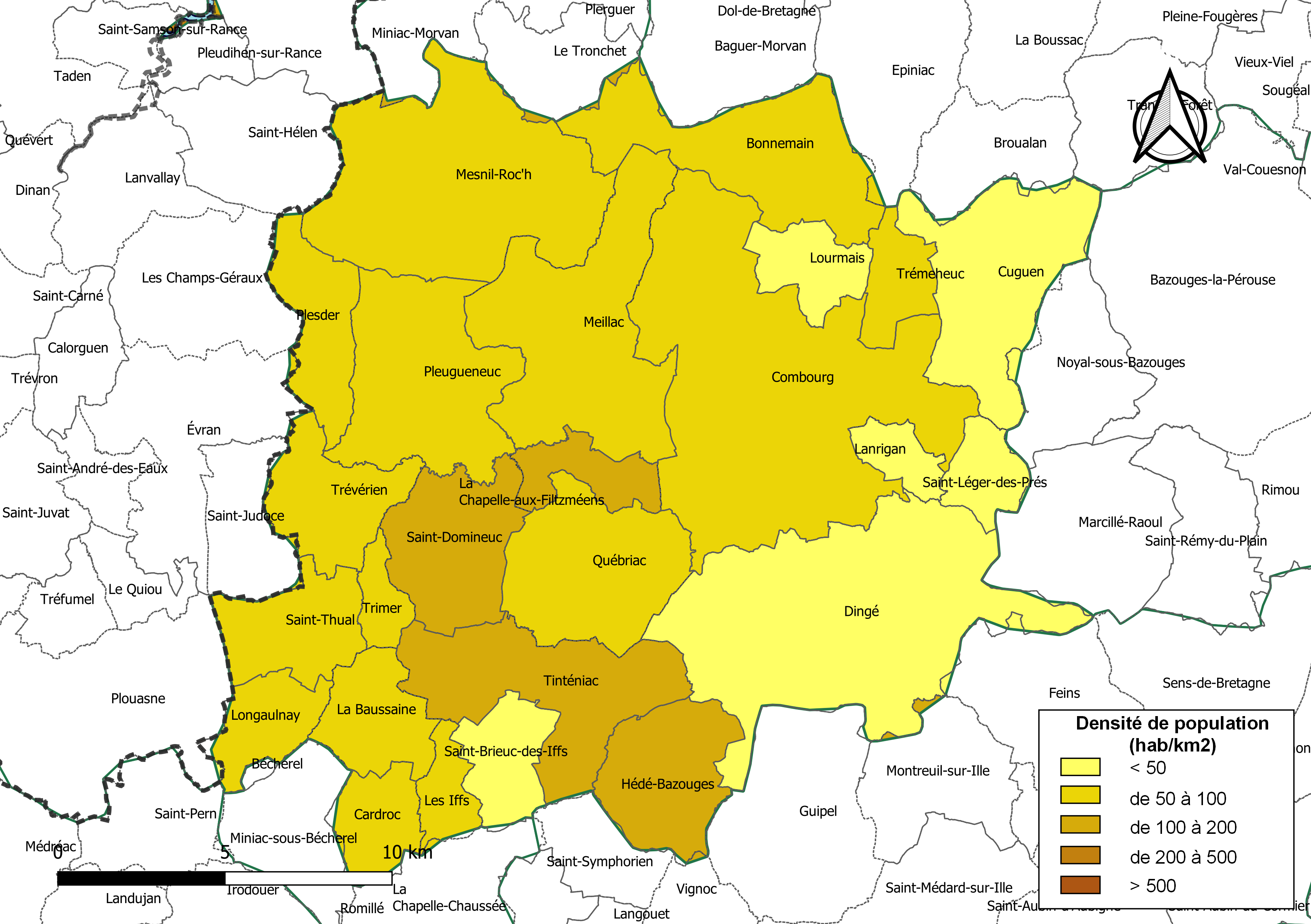 Carte des densités de population (millésimée 2016) des communes de la Communauté de communes Bretagne Romantique, département d'Ille-et-Vilaine, France. Composition au 1er janvier 2019.